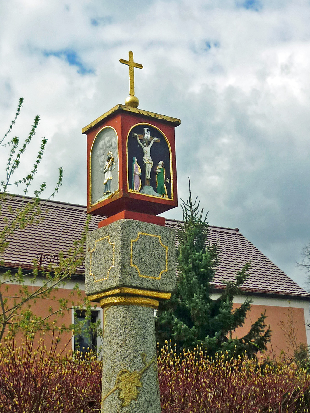 Bildstock in Laske (Ralbitz-Rosenthal), Am Klosterwasser